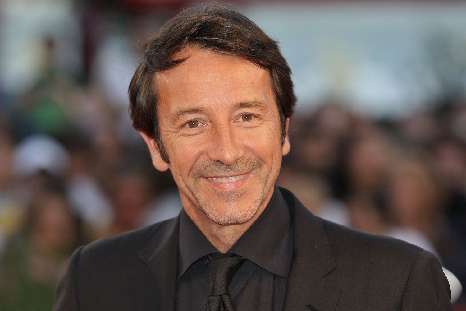 66ème Festival du Cinéma de Venise (Mostra), 4ème jour (05/09/2009). Tapis Rouge avec Jean-Hugues Anglade pour le film : Persécution.